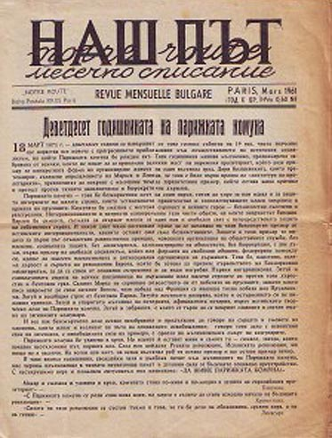 Титулна страница на списание "Наш път", което излиза от 1952 г. до март 1991 г. Издание на ФАКБ. Печата се в Париж.